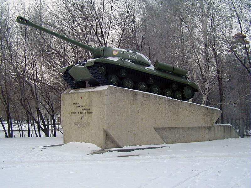 Танк ИС-3 в Ульяновске